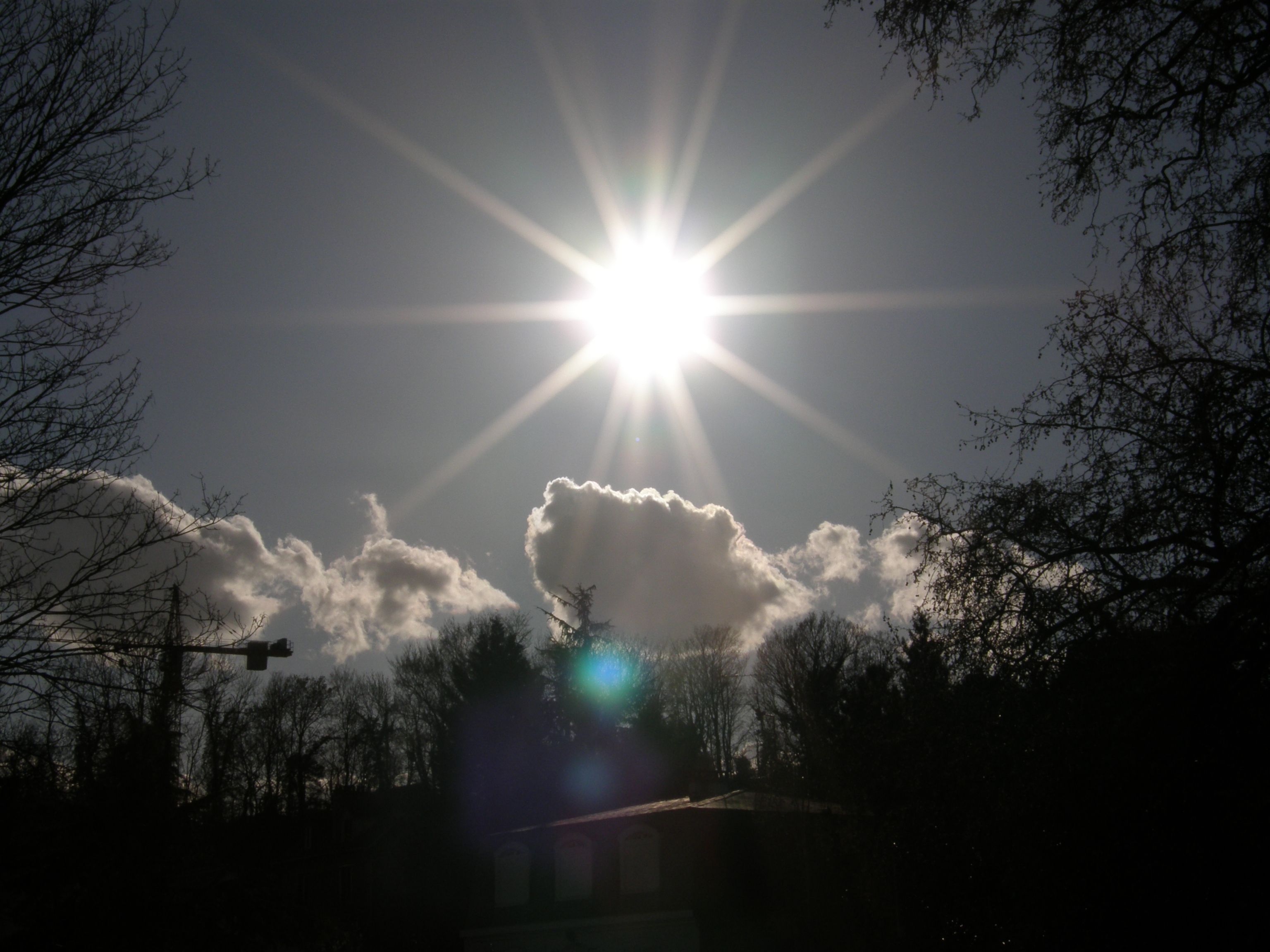 Soleil (voir en bas de page les caractéristiques de l'appareil photo).